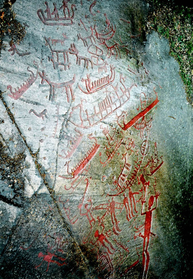 Schiffe und zeugungspotente Götter auf der Bildstelle von Backa, Brastad, Lysekil Gemeinde, Bohuslän, Schweden.